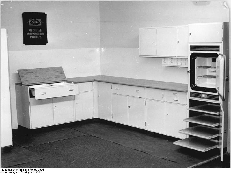 Zentralbild-Leipzig-Krueger We-Qu Auslandsversand 28.8.1957 1.9.1957 Leipziger Herbstmesse 1957. UBz. Der VEB Buchsbach Küchenmöbelfabrik Radeberg-Sa zeigt im Union-Messehaus eine neuentwickelte Küche, bestehend aus verschiedenen Einbauschränken mit Eisschrank.